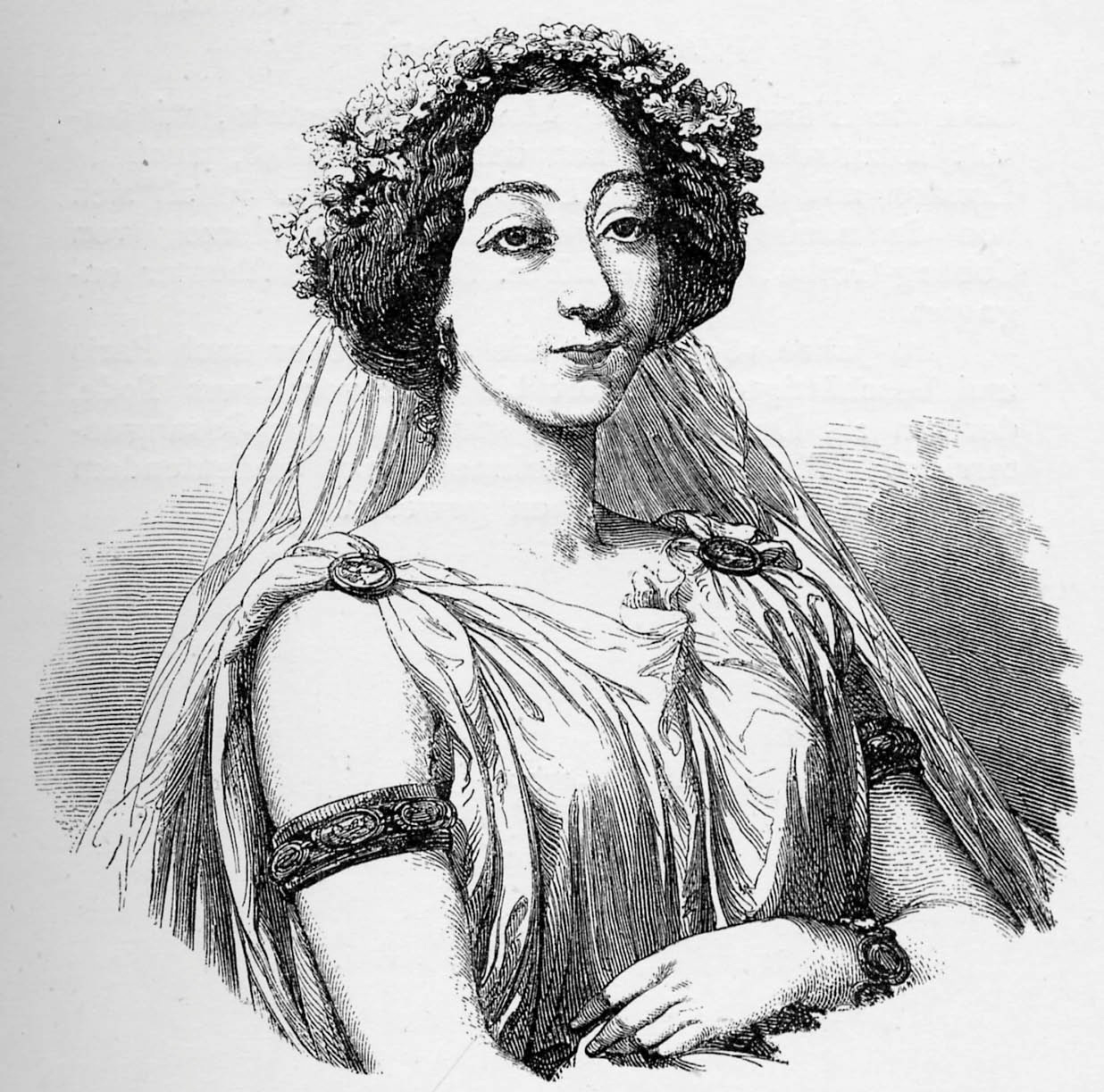 Anna Bochkoltz-Falconi (also known as Anna Bochkoltz)